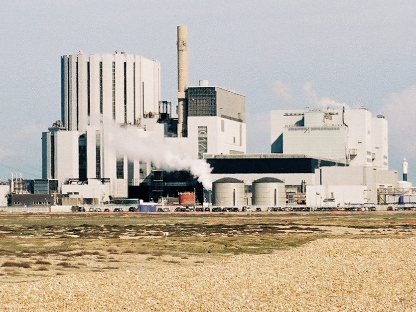 Dungeness B power station in Kent, UK.